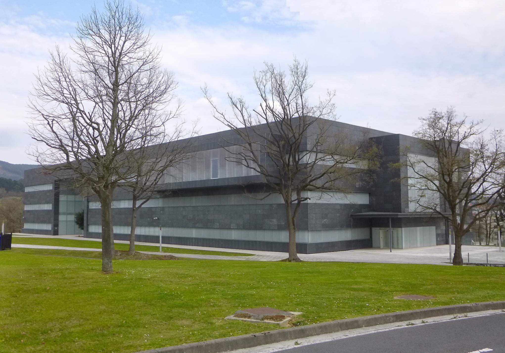 Edificio de Ibermática en el Parque Científico y Tecnológico de Bizkaia (Derio, Bizkaia)